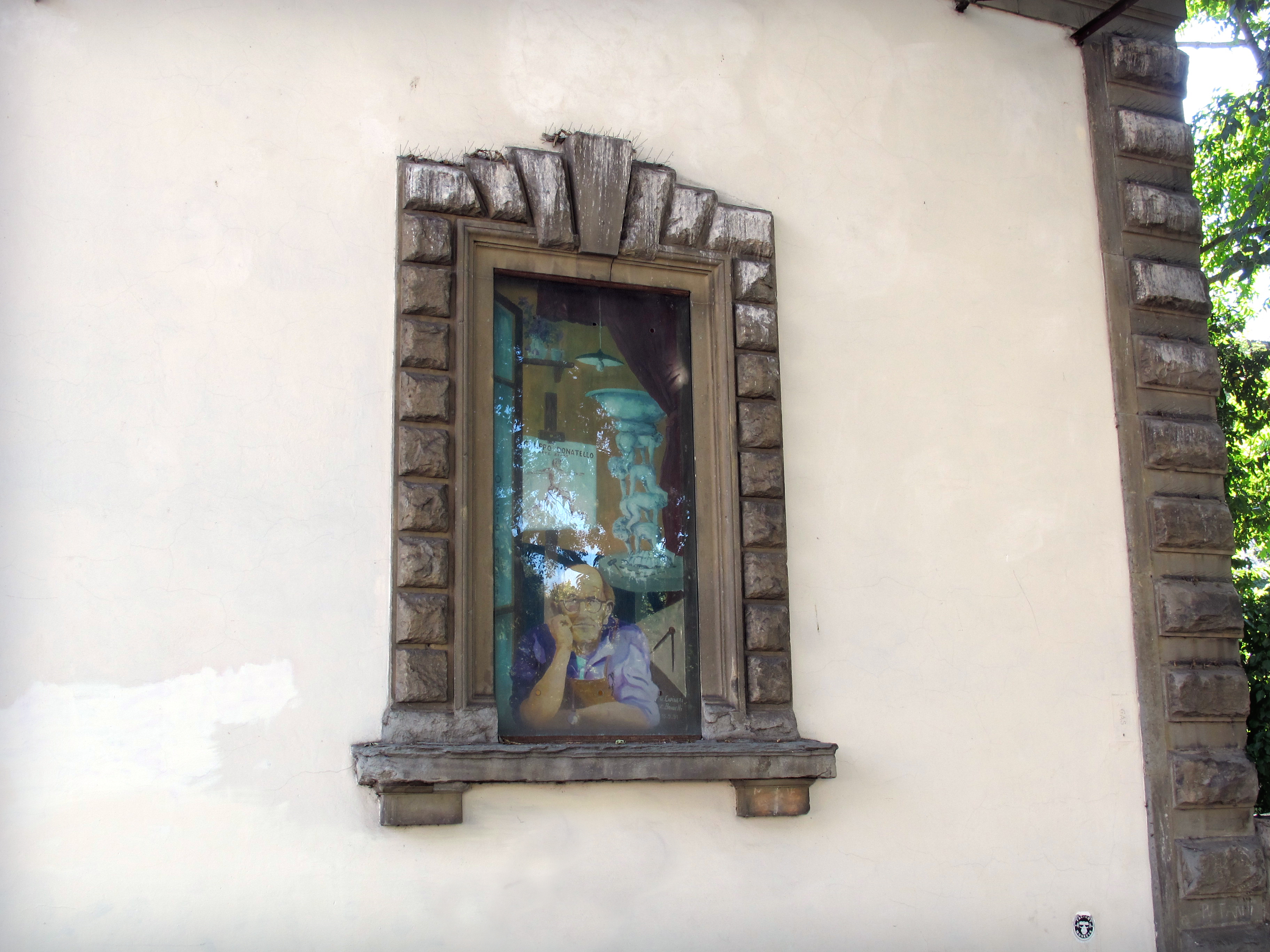 Piazza Vasari (Firenze)